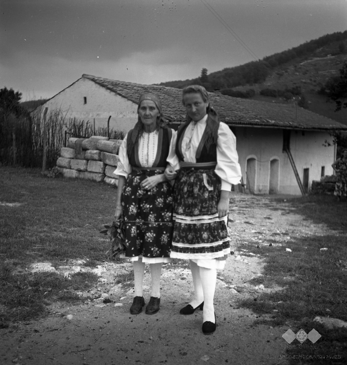 Mara Zatkovič, roj. 1880 (ti zgorenji Oštirjevi) in Marta Ložar v munski noši. Račice.